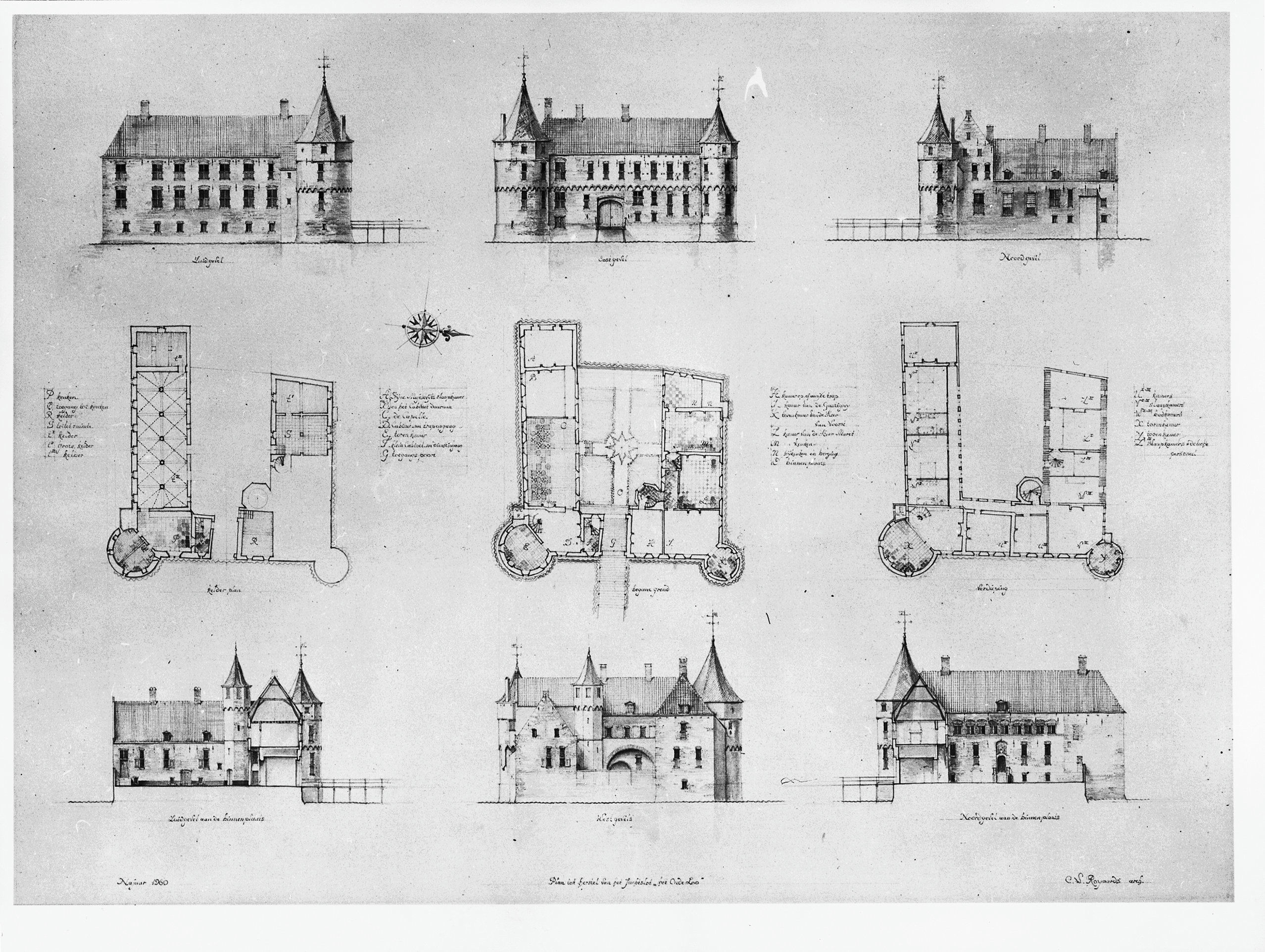 Het Oude Loo: reproductie tekening Royaards, opmeting